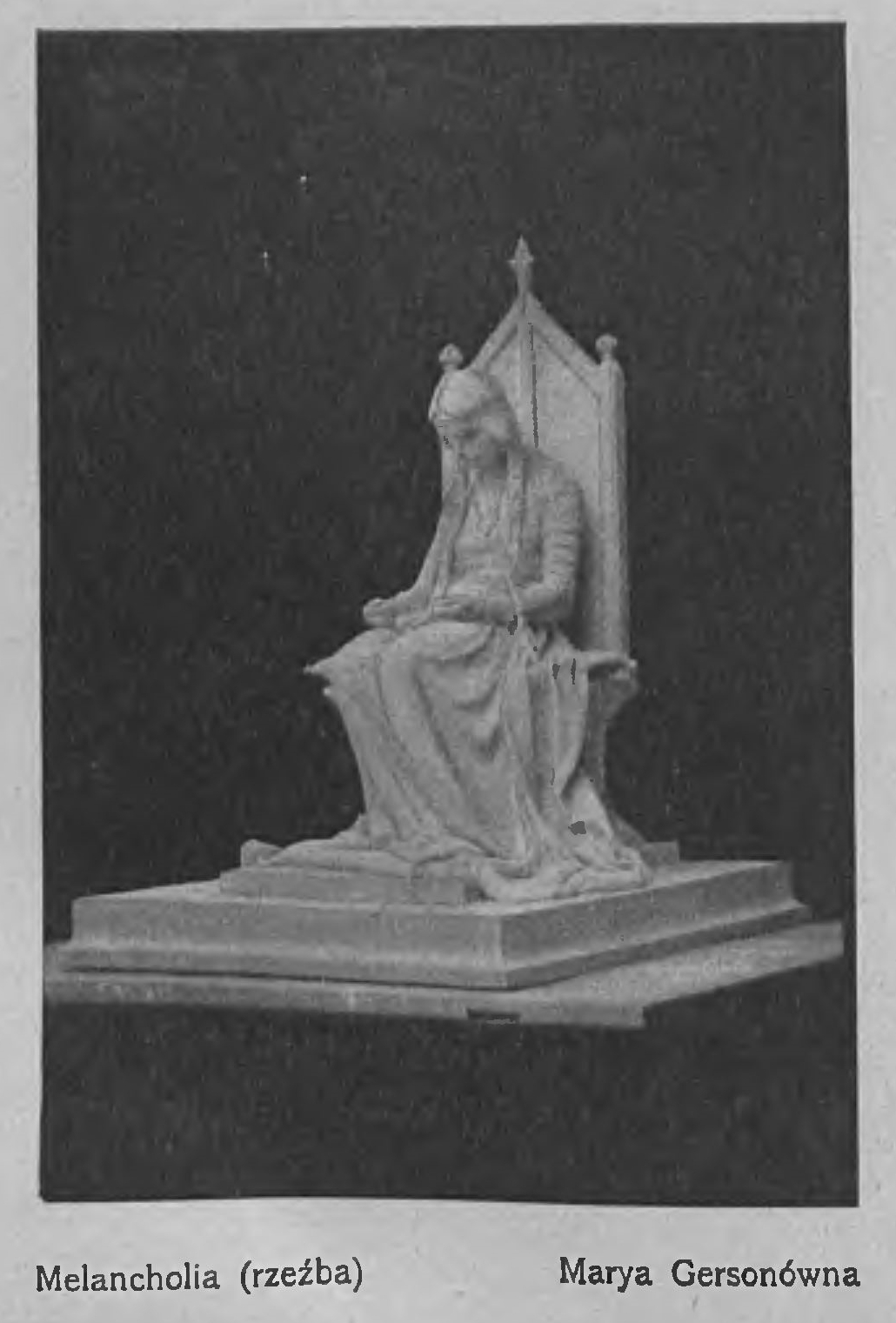 Reprodukcja opublikowana w: "Tygodnik Illustrowany" 1899, nr 40, s. 792.